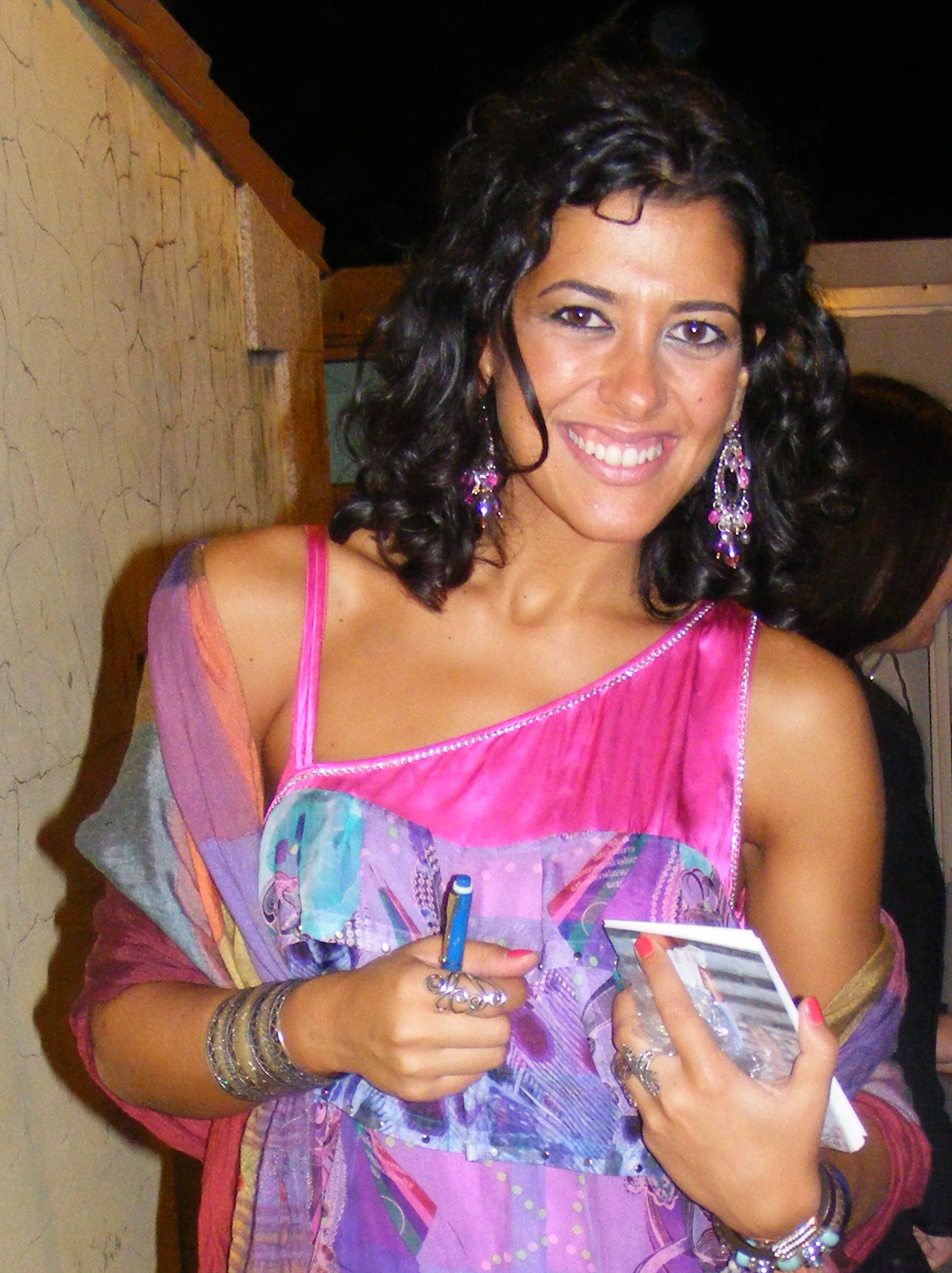 Lucía Pérez cantante española representó a España en el Festival de la Canción de Eurovisión 2011, na Festa do Alivio 2013 en Tomiño, Pontevedra